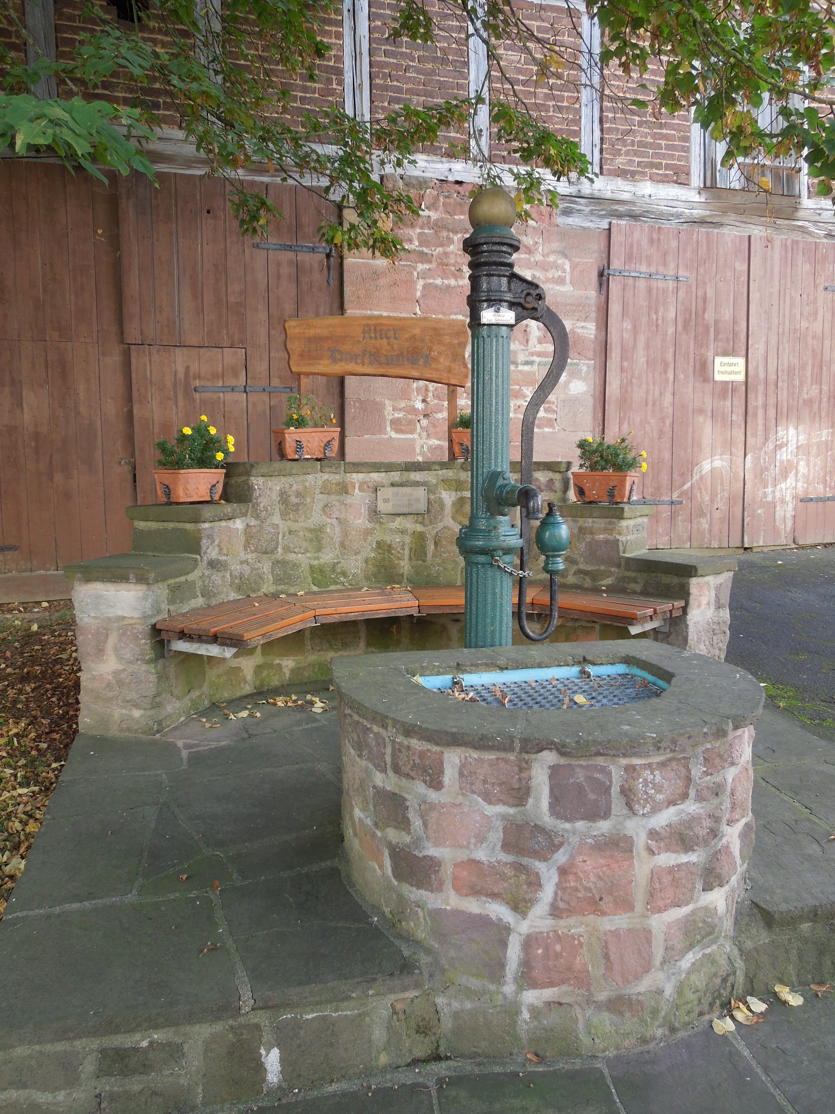 Brunnen in Arnsbach (Borken)